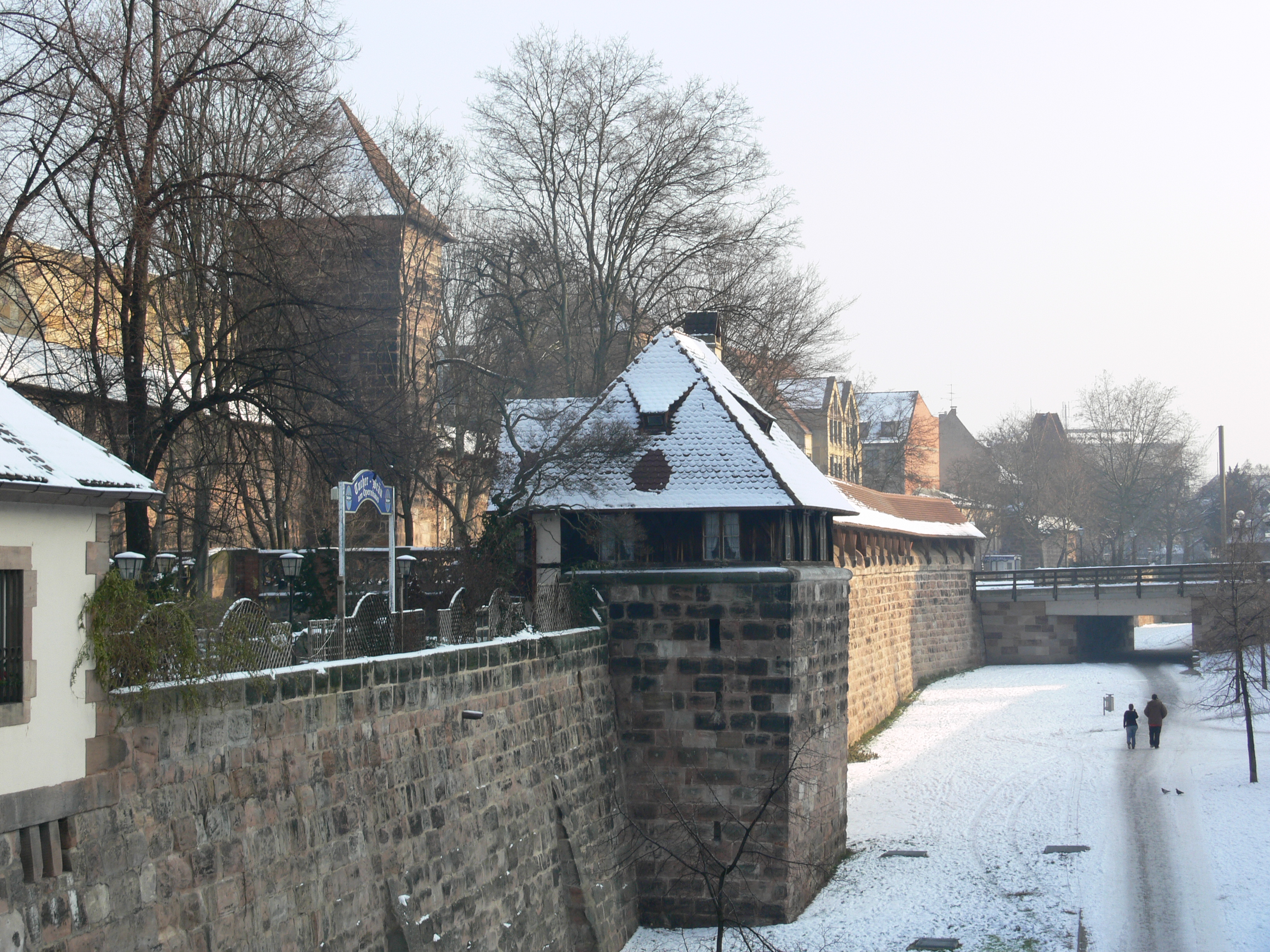 Nürnberg, Stadtbefestigung, Abschnitt "Frauentormauer" Turm "rotes B", Feldseite, und Kasemmattenturm VIII